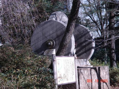 板橋火薬工場を創立した澤太郎左衛門の遺徳を称え建てられた記念碑。